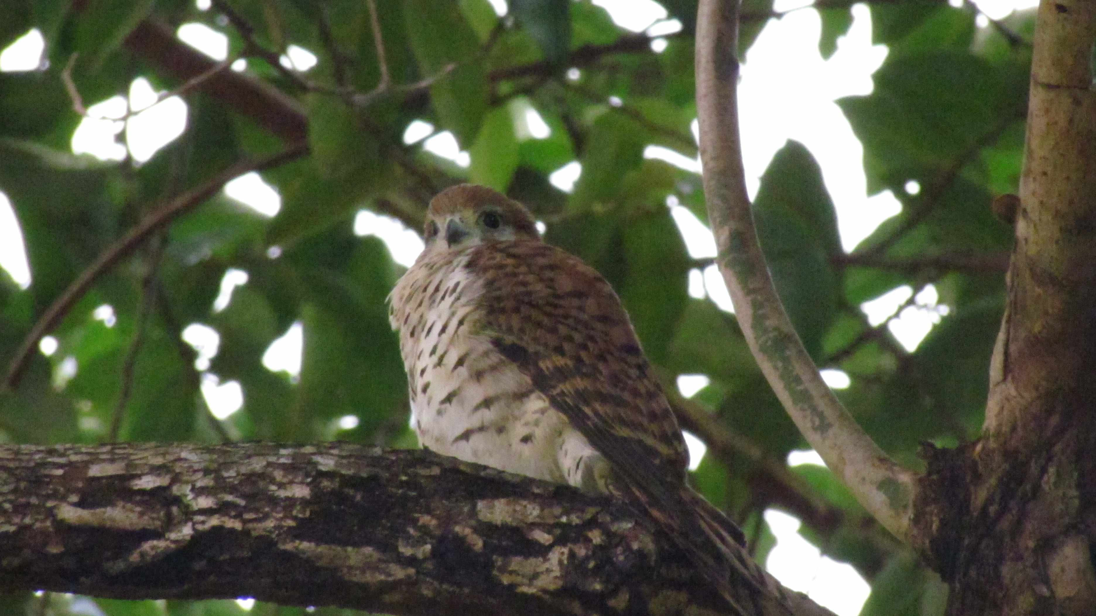 Mauritius Kestrel